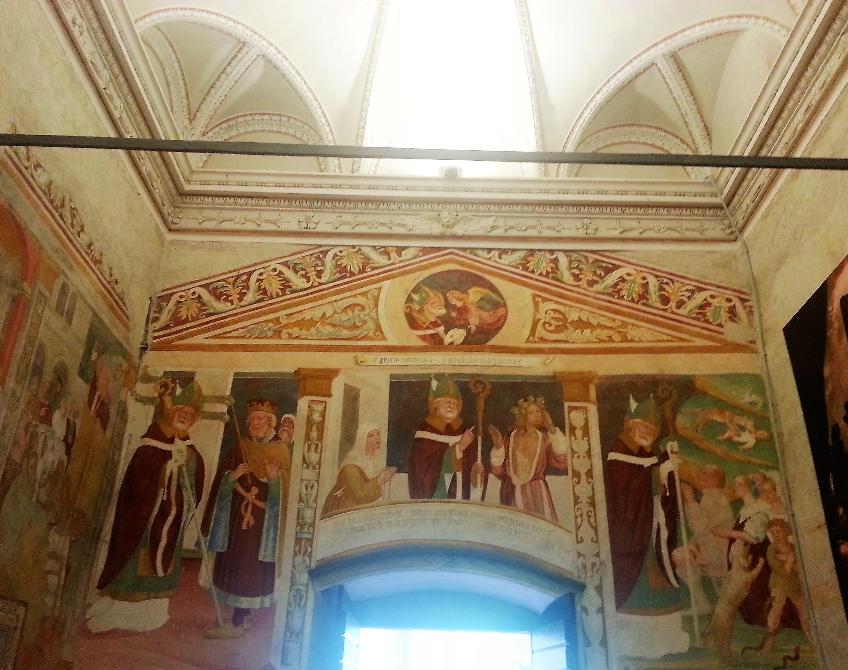 Affreschi nel sacello della chiesa di san Patrizio di Colzate